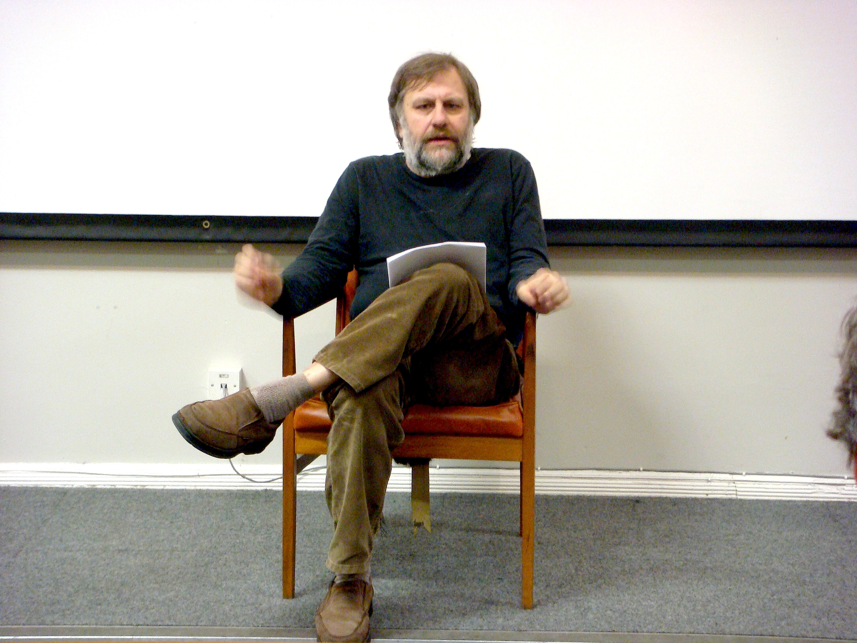 Slovenian philosopher Slavoj Zizek in Liverpool.